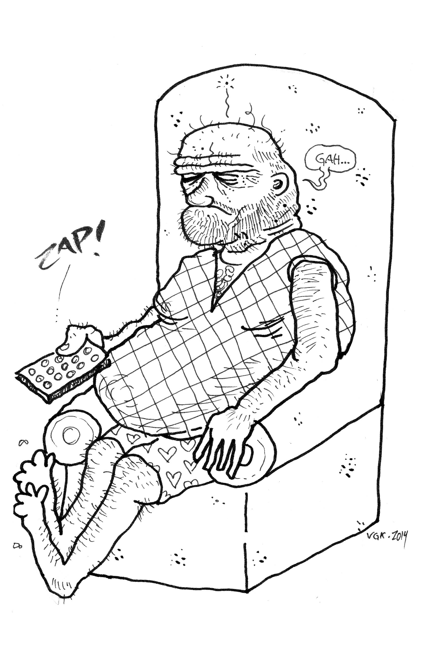 Ilustrasjonen viser en døgenikt i sitt typiske habitat.